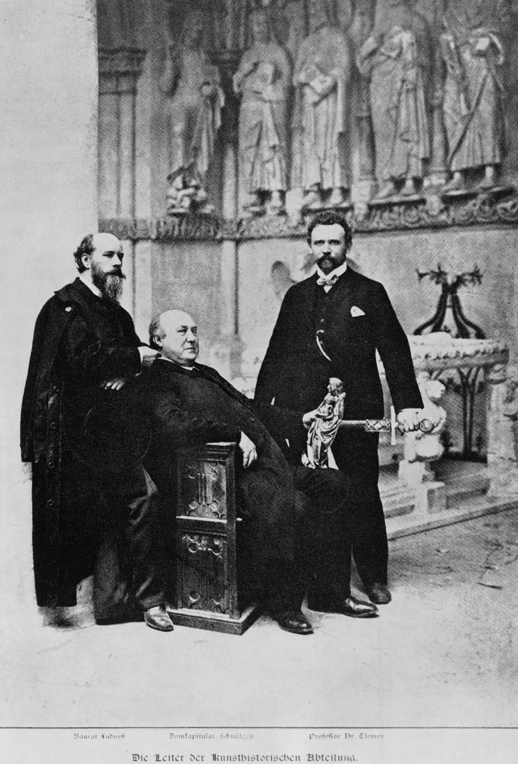 Provinzialkonservator Albert Ludorff (links), Domkapitular Alexander Schnütgen, Paul Clemen (rechts)